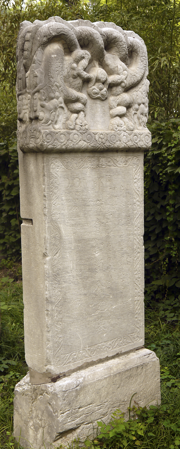 Grabstein